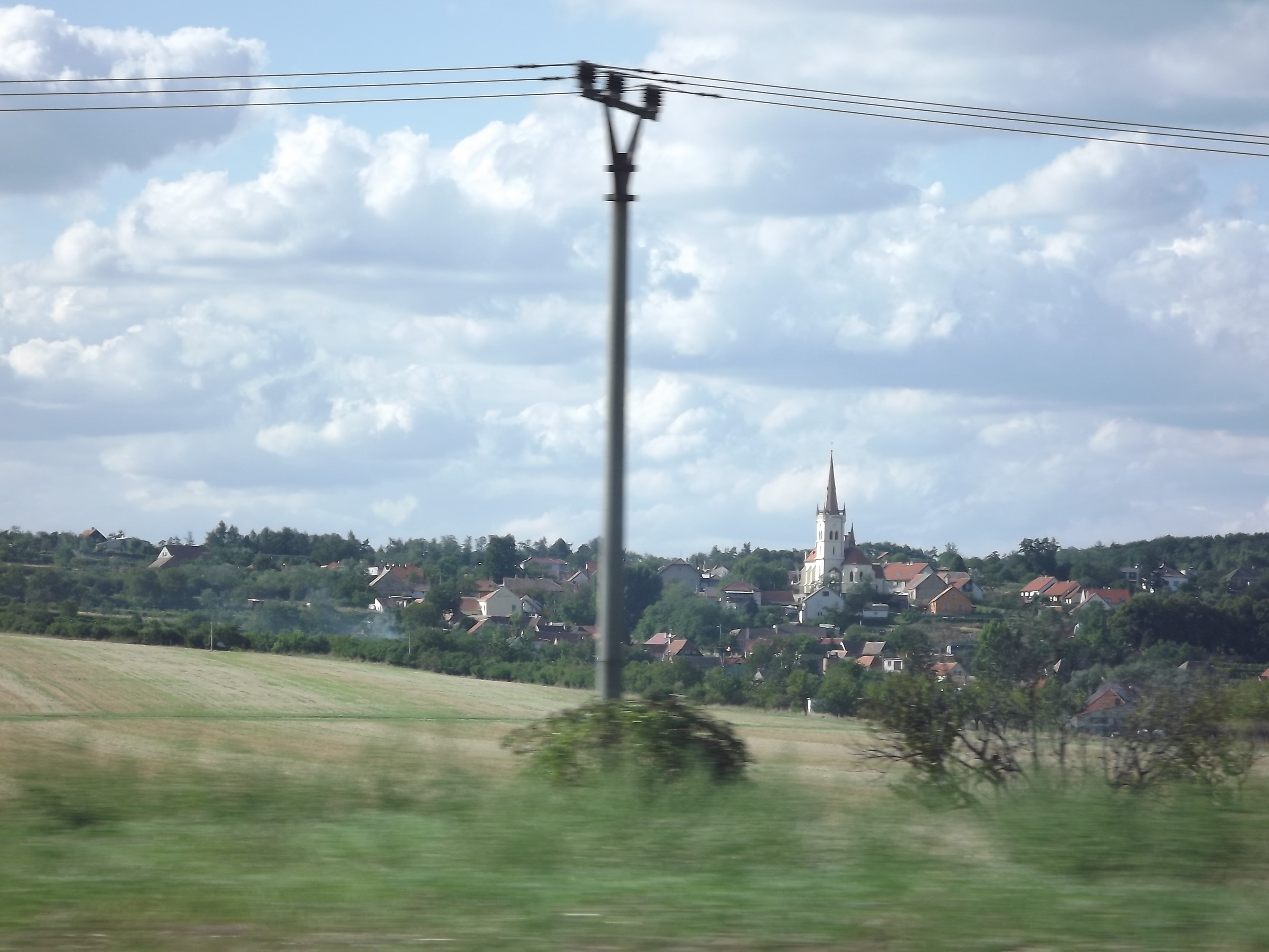 Kostel (Konice), Konice